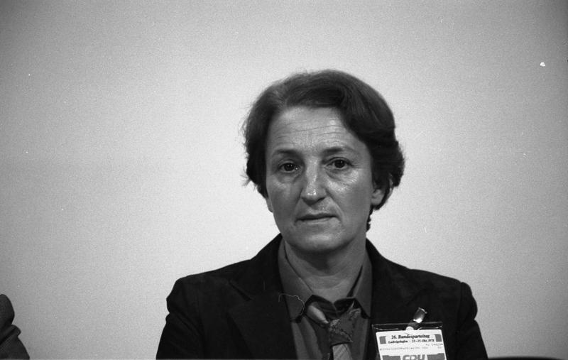 26. Bundesparteitag der CDU in der Friedrich-Ebert-Halle in Ludwigshafen 23.-25.10.1978